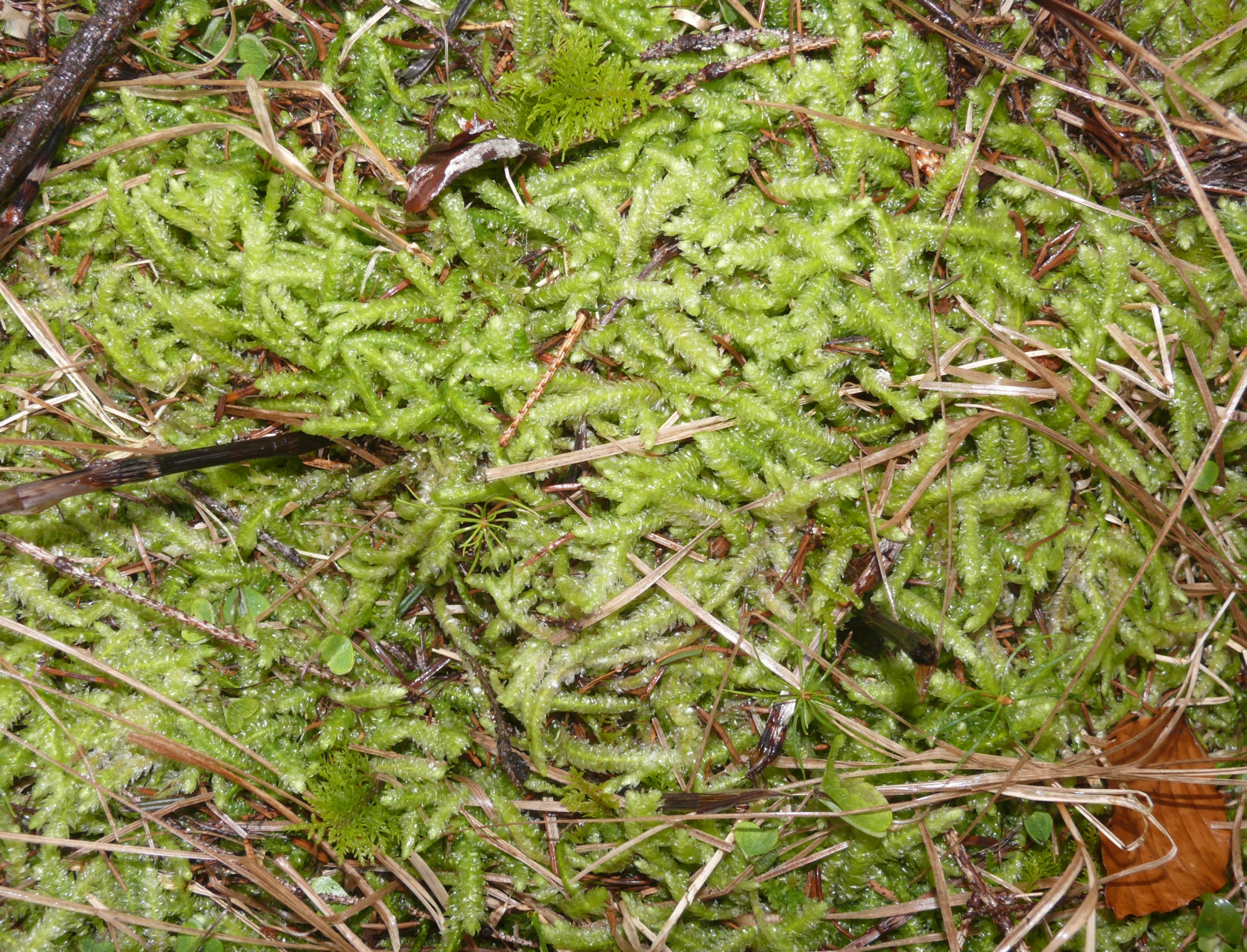 Plagiothecium undulatum, Schwäbisch-Fränkische Waldberge, Germany